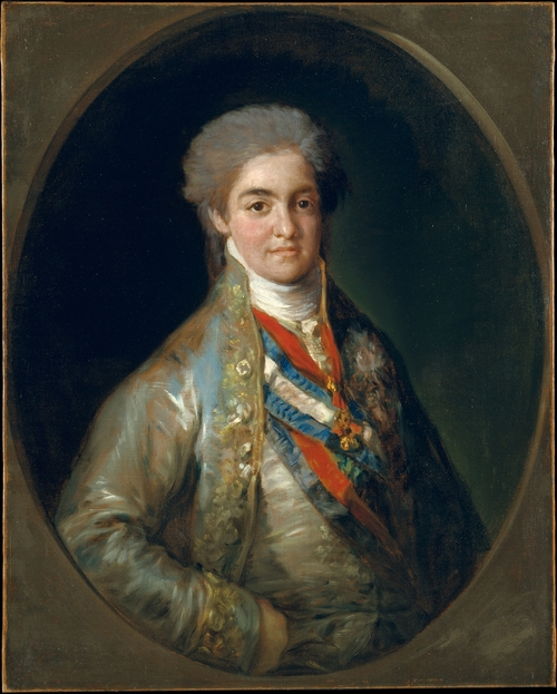 Boceto preparatorio para La familia de Carlos IV